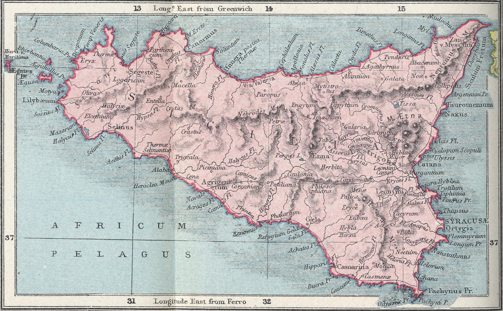 La Sicilia antica